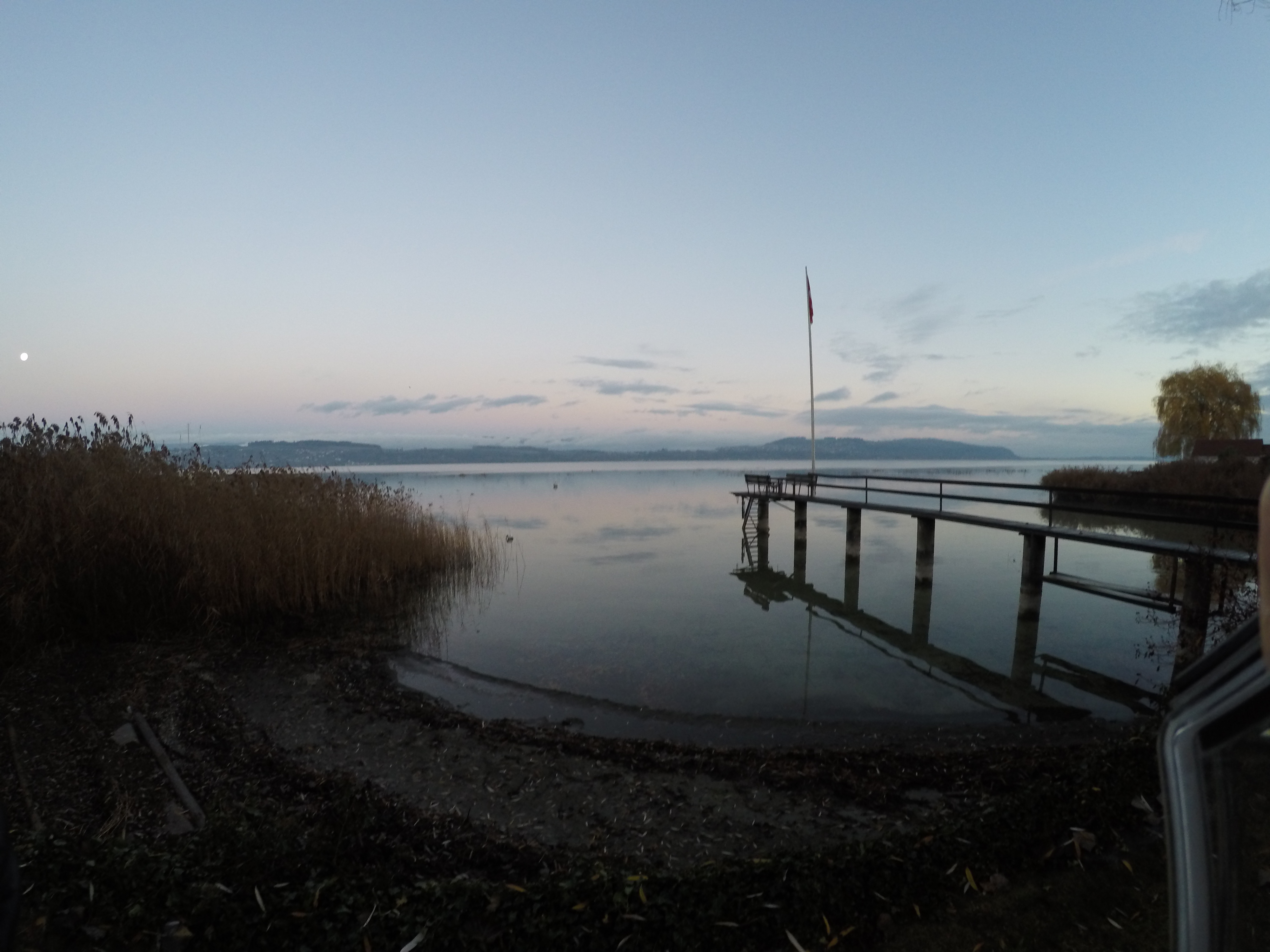 Photo by Gleb Zayarskiy (Jamer112) My own work